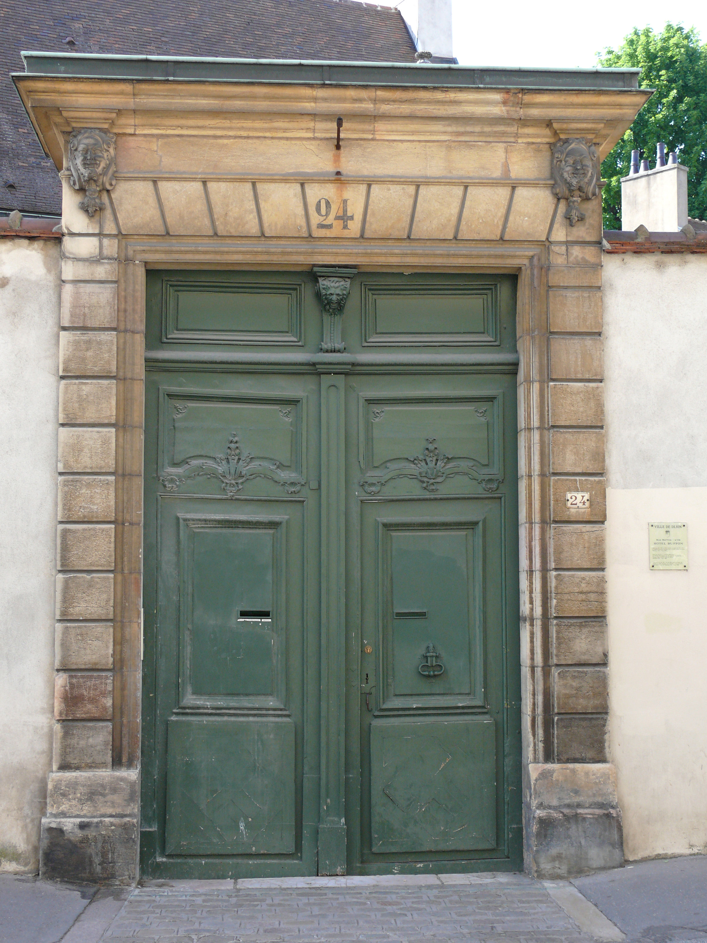 Dijon - Hôtel Buffon - Portail